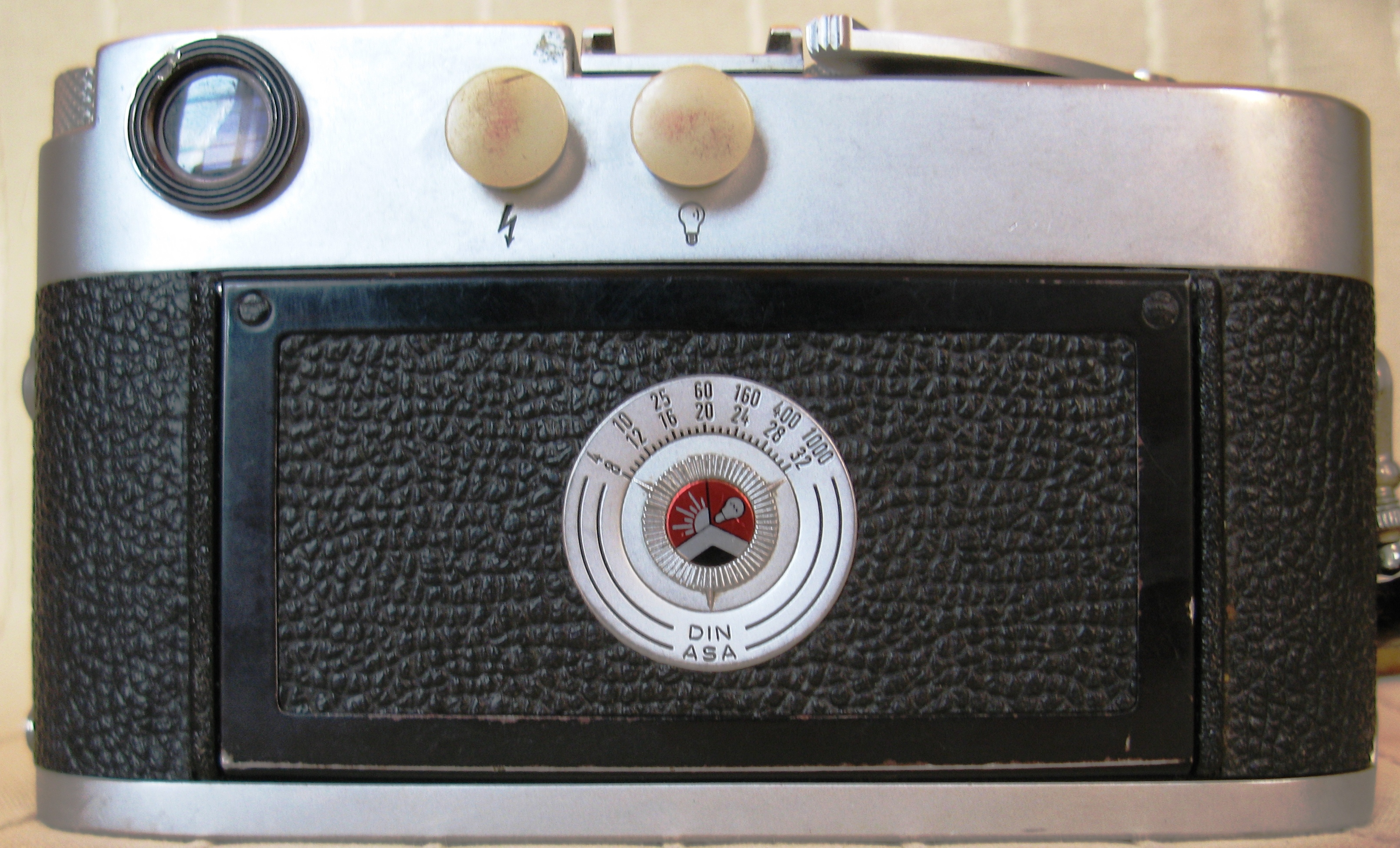 Eng Leica M2 hënnescht Säit. Kategorie:Fotoapparaten